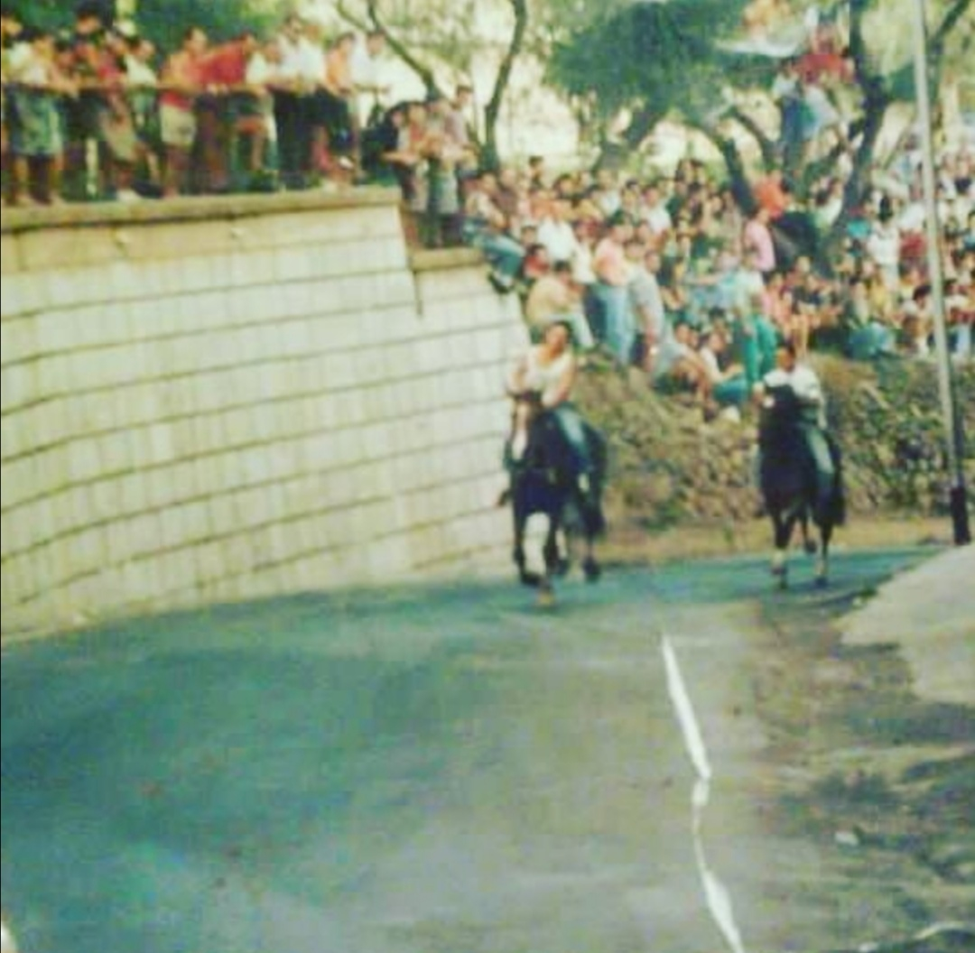 Palio di San Rocco 1